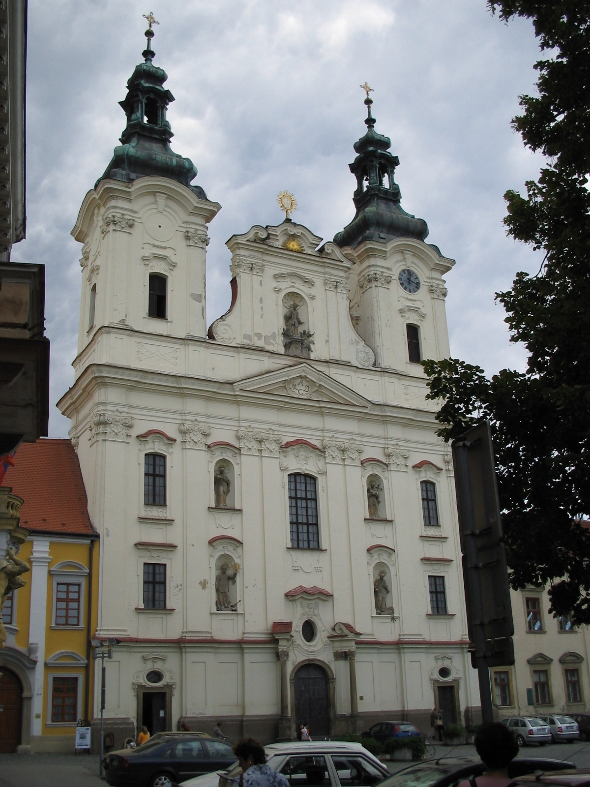 Kostel svatého Františka Xaverského, Uherské Hradiště